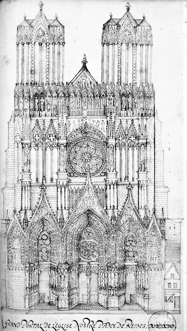 Cathédrale Notre-Dame de Reims - Façade occidentale - Manuscrit Français 9152 : « Recherches de plusieurs singularités, par Françoys Merlin, controlleur général de la maison de feu madame Marie-Élizabeth, fille unique de feu roy Charles dernier,... portraictes et escrites par Jacques Cellier, demourant à Reims. » (1583-1587)